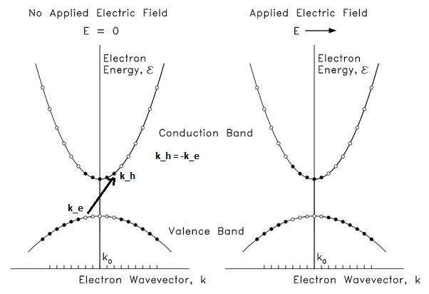 valentieband in vector ruimte, met gat